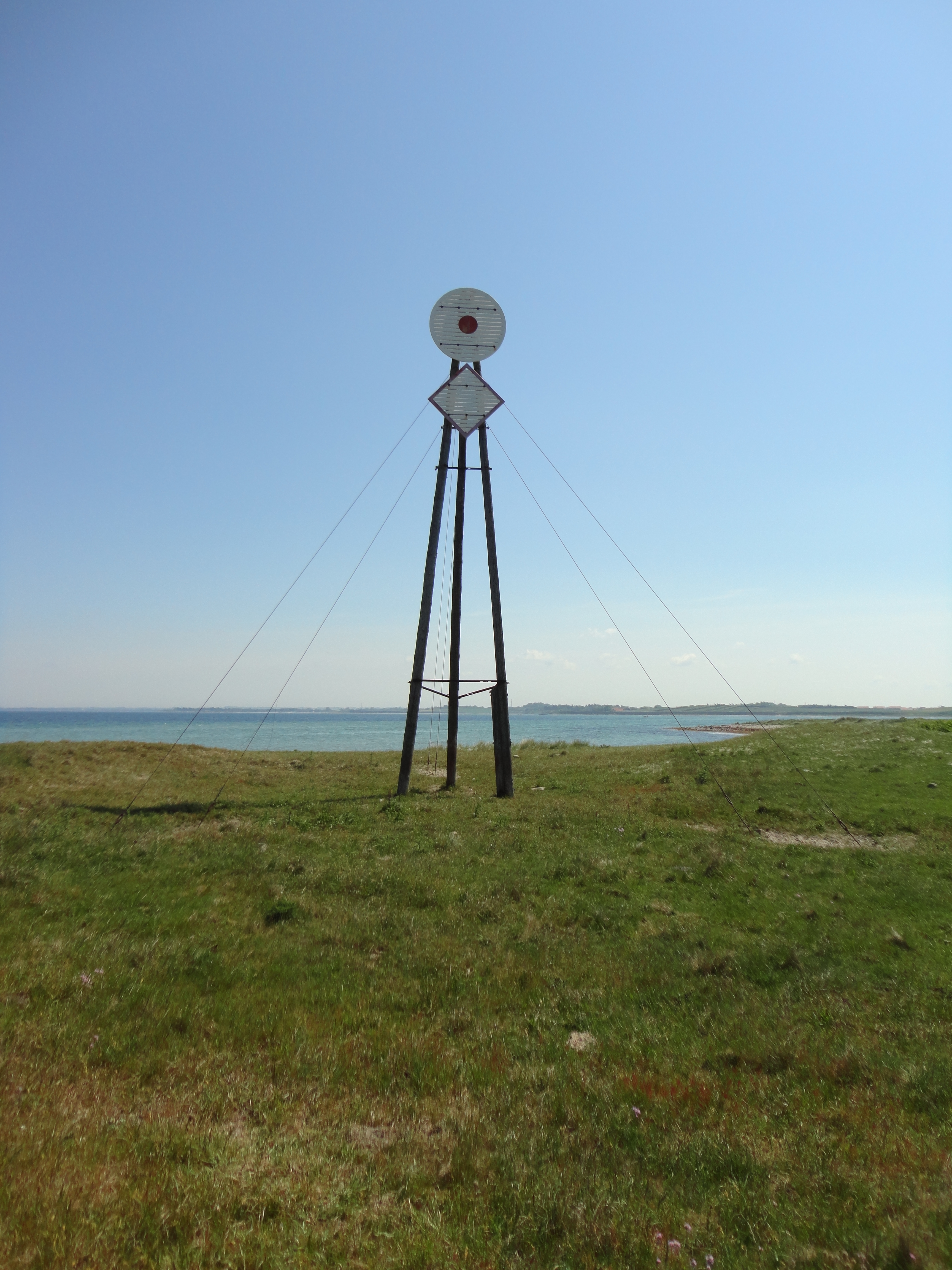 Sømærke på Lejodde